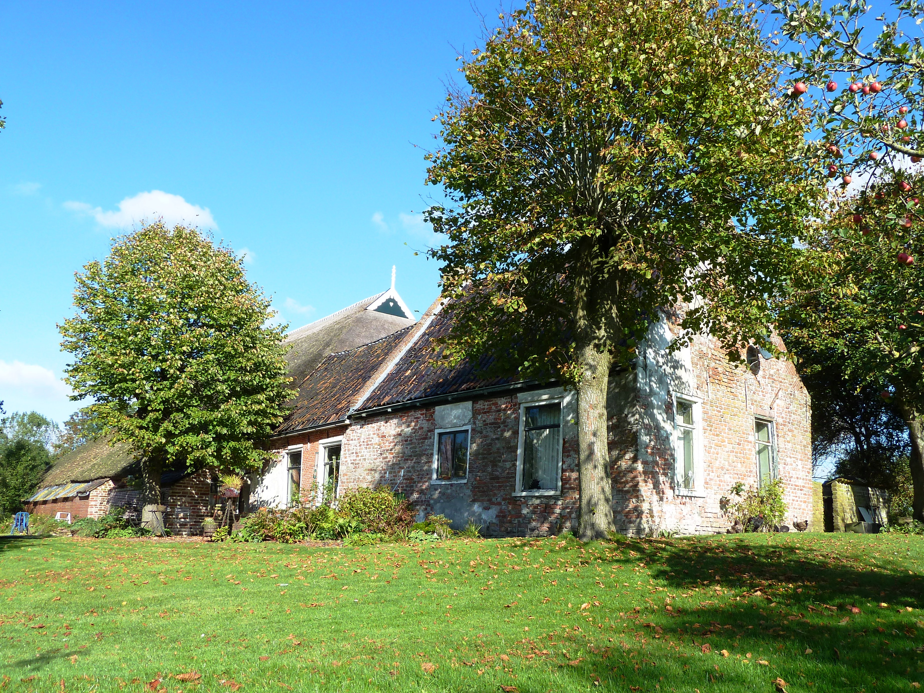 kop-hals-rompboerderij op verhoging in landschap en met omgrachting. Kop van woongedeelte mogelijk oorspronkelijk uit eerste helft 16e eeuw.